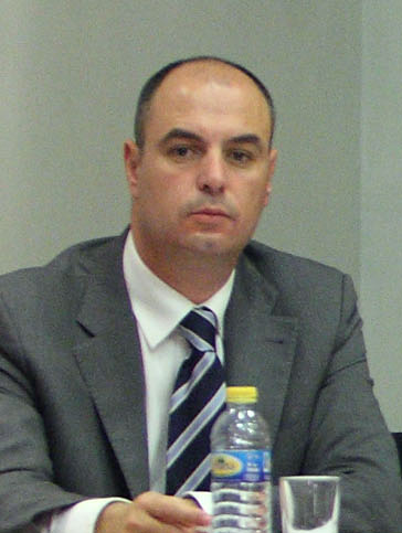 Toledo, 17-11-2014.- El consejero de Educación, Cultura y Deportes, Marcial Marin durante su comparecencia en la Comisión de Economía y Presupuestos de las Cortes de Castilla-La Mancha que preside Milagros Tolón (2d), acompañado de la secretaria general de la Consejería, Laura Tárraga (2i) y el viceconsejero, José Jaime Alonso (i). A la derecha de la imagen, Antonio Martínez Gómez. (Foto: Álvaro Ruiz // JCCM)